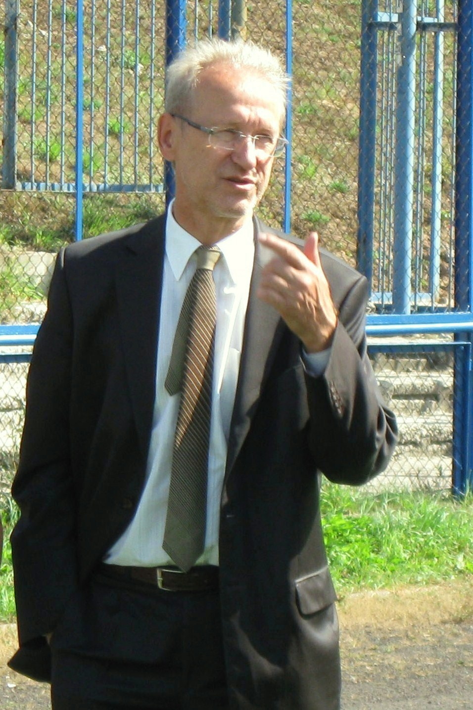 Ryszard Stachurski, urzędnik państwowy i samorządowy (m.in. wojewoda pomorski).